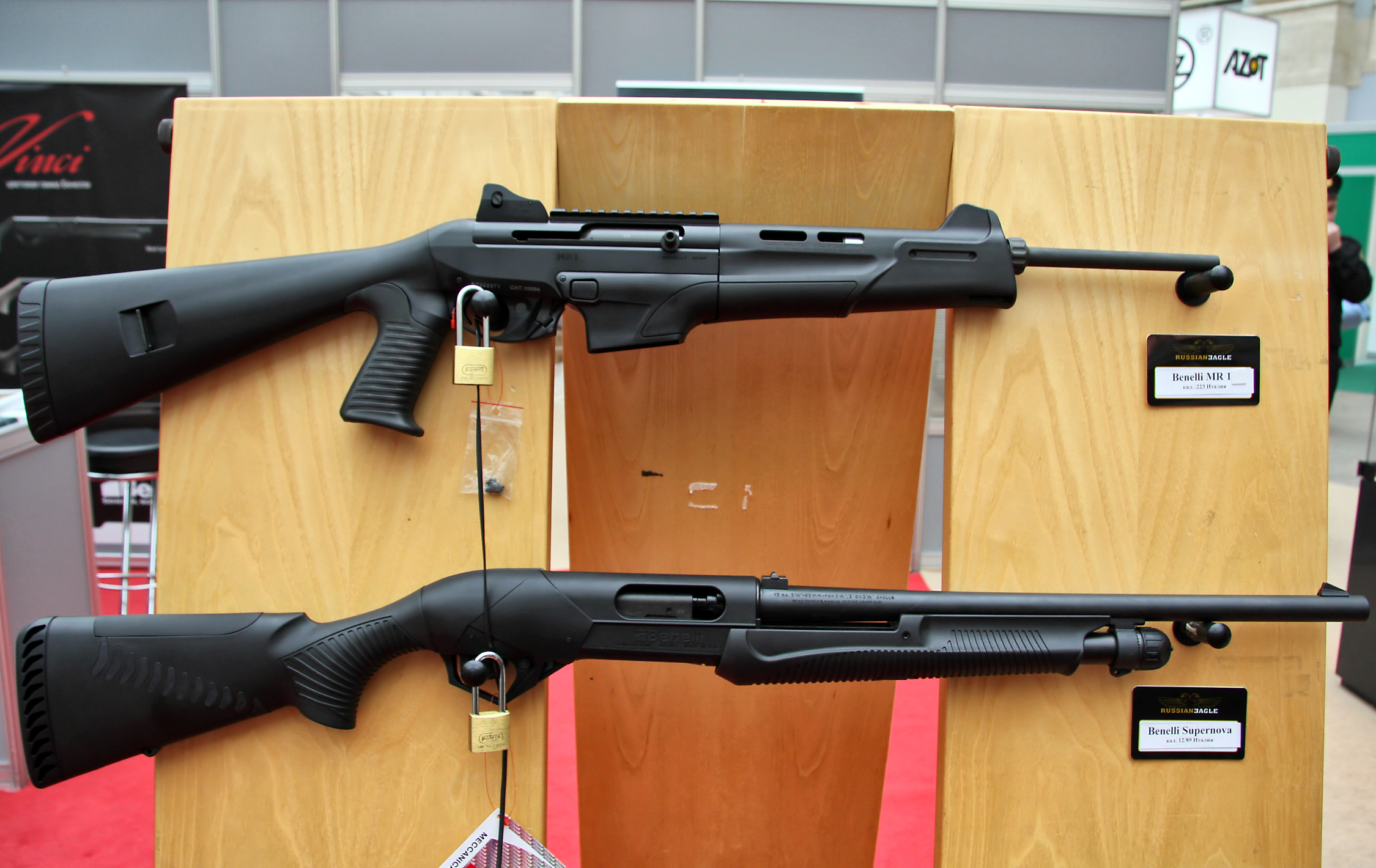 Винтовка Benelli MR 1 и ружье Benelli Supernova (Benelli MR 1 rifle and Benelli Supernova shotgun)